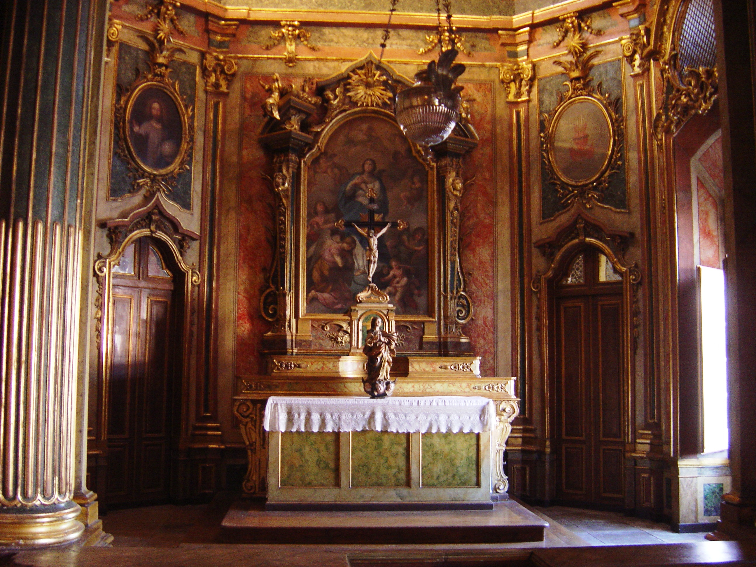 Queluz National Palace, Portugal